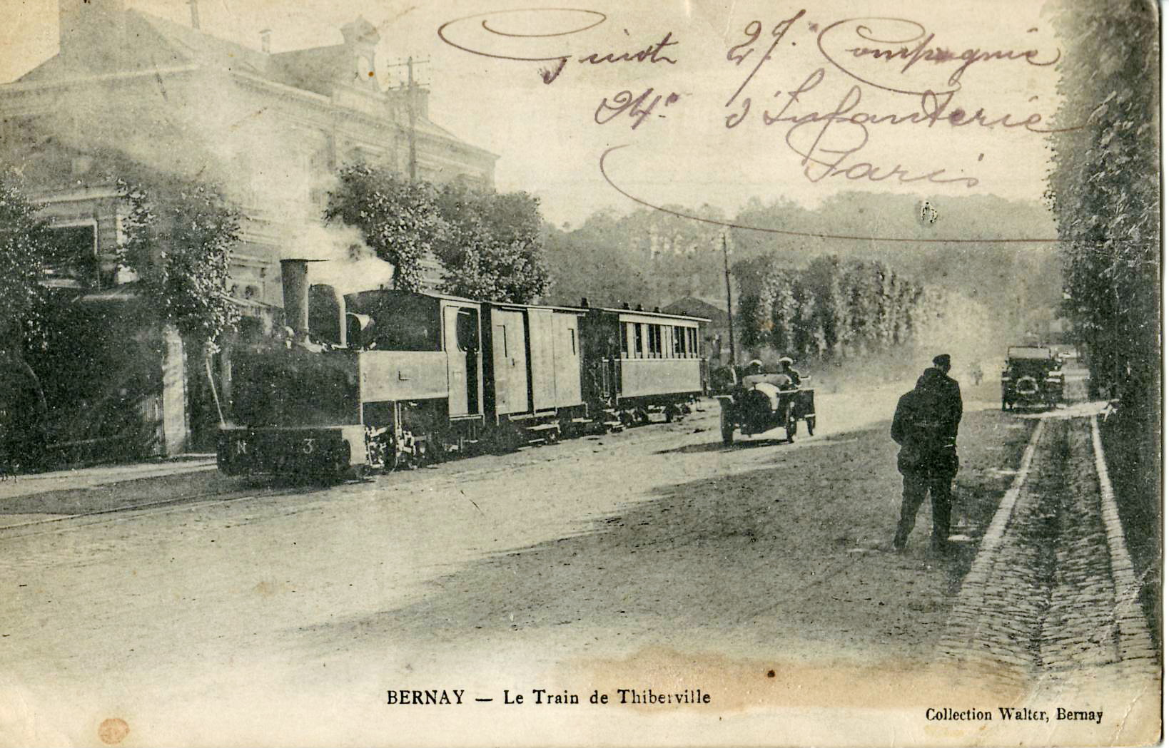 Carte postale éditée par Walter à Bernay : BERNAY - Le train de Thiberville